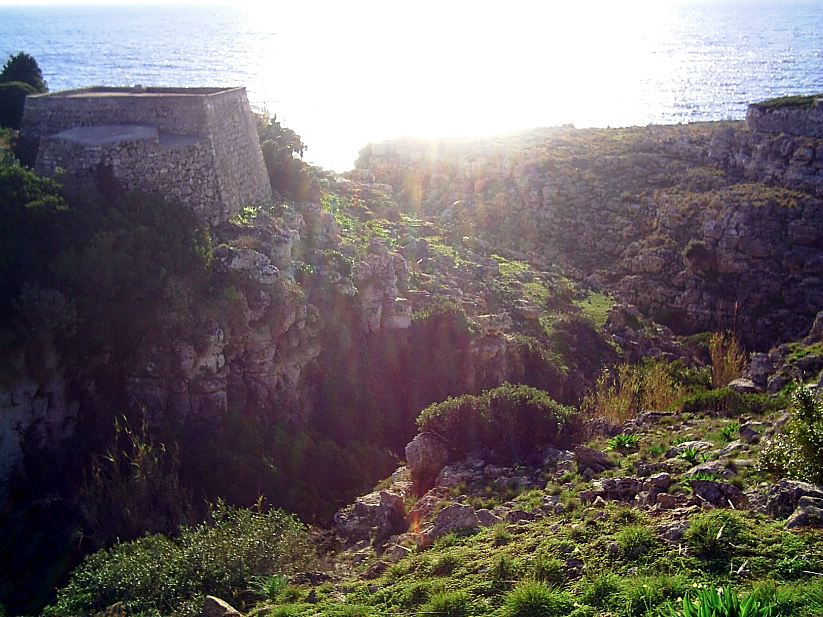 particolare tra felloniche e leuca